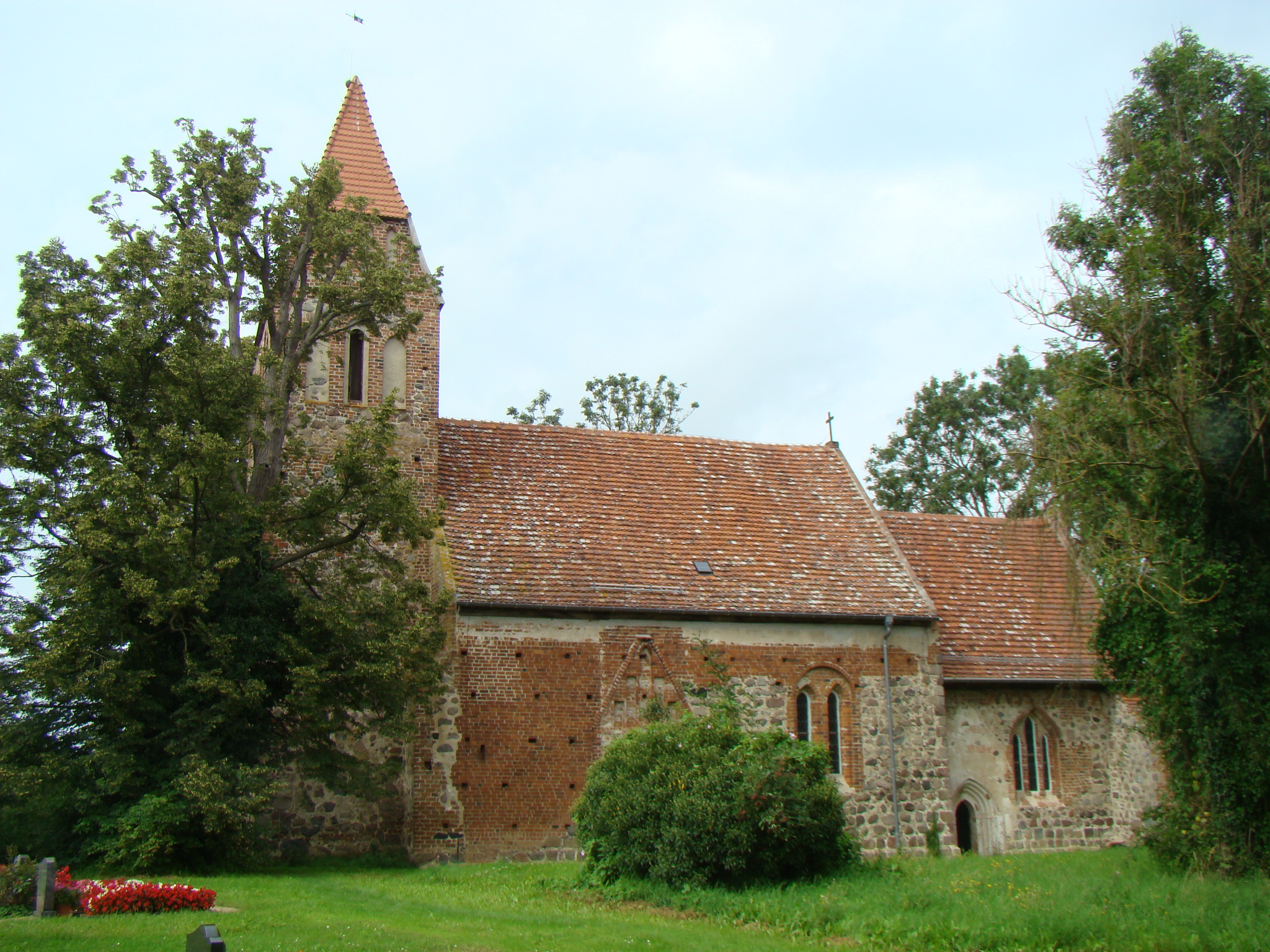 Dorfkirche Bülow. Foto: Peter Schmelzle, 2011.